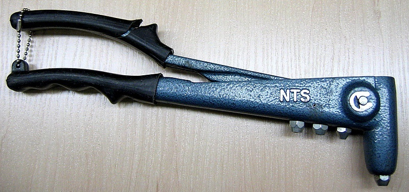 Needitangid